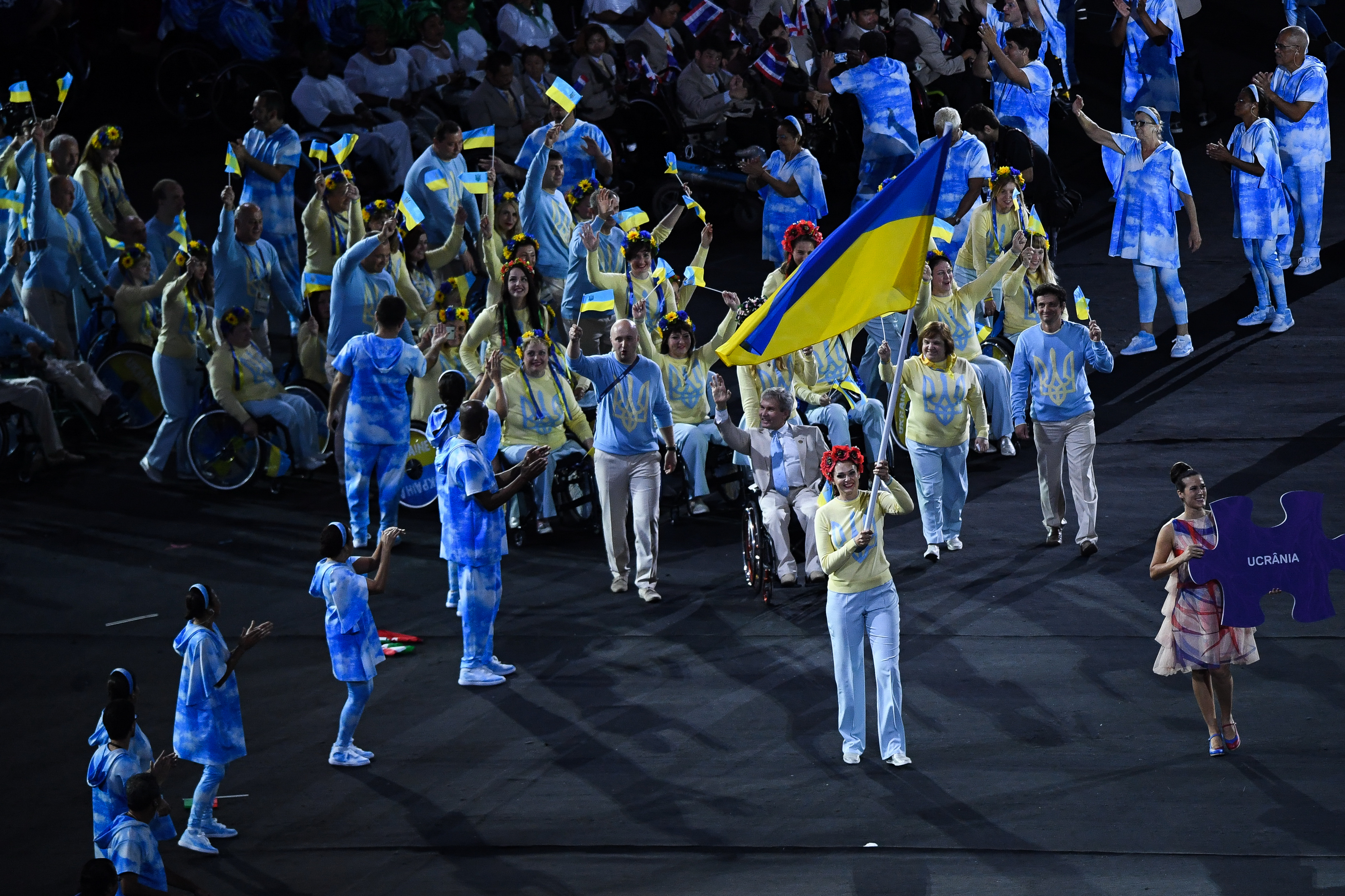 Rio de Janeiro - Cerimônia de abertura dos Jogos Paralmpicos Rio 2016 no Estdio do Maracanã (Tomaz Silva/Agência Brasil)